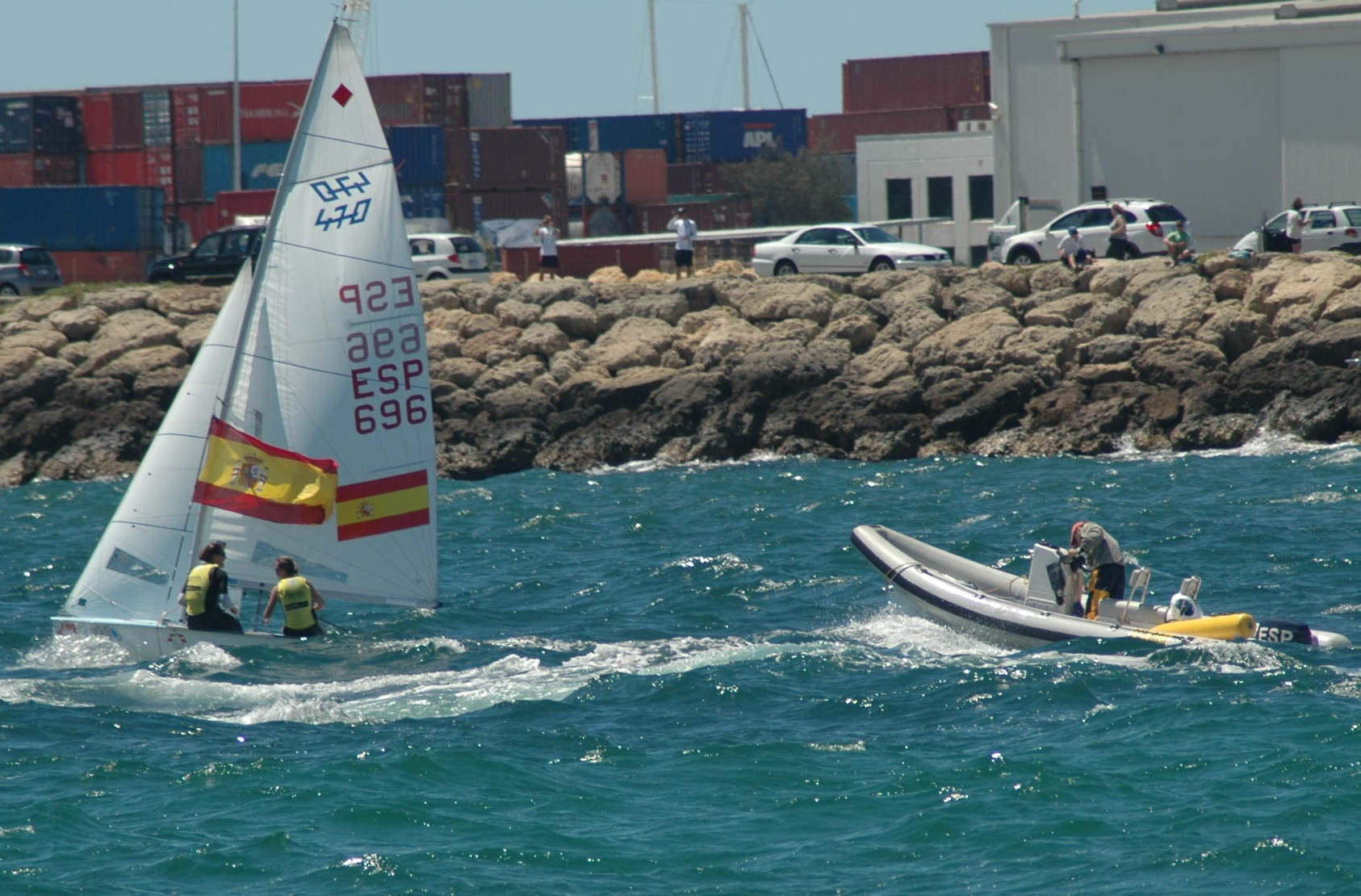 Equipo español de la clase 470 en el Mundial de Perth en 2011 formado por Berta Betanzos y Tara Pacheco.